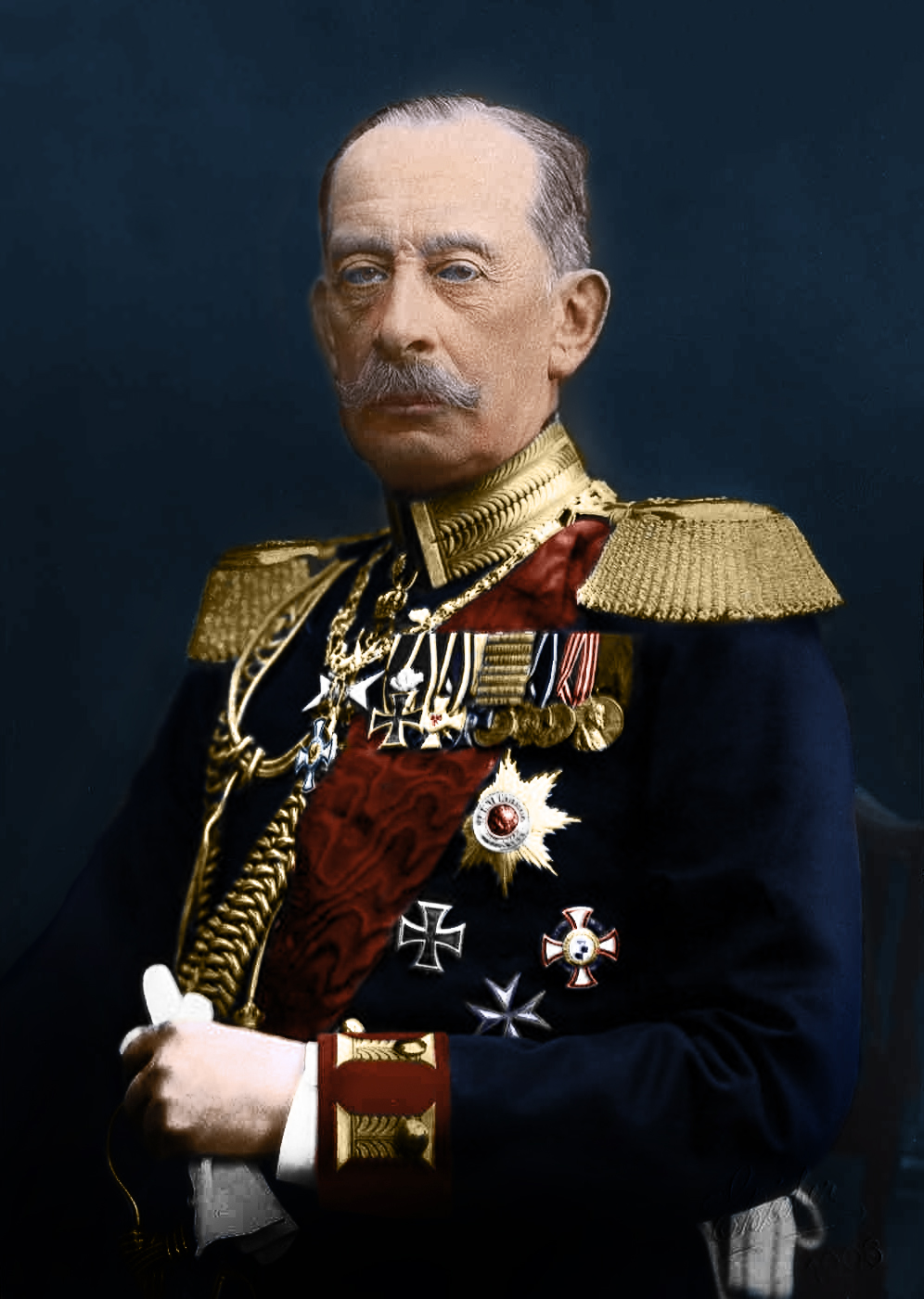 Ich habe Alfred von Schlieffen "neu eingefärbt"